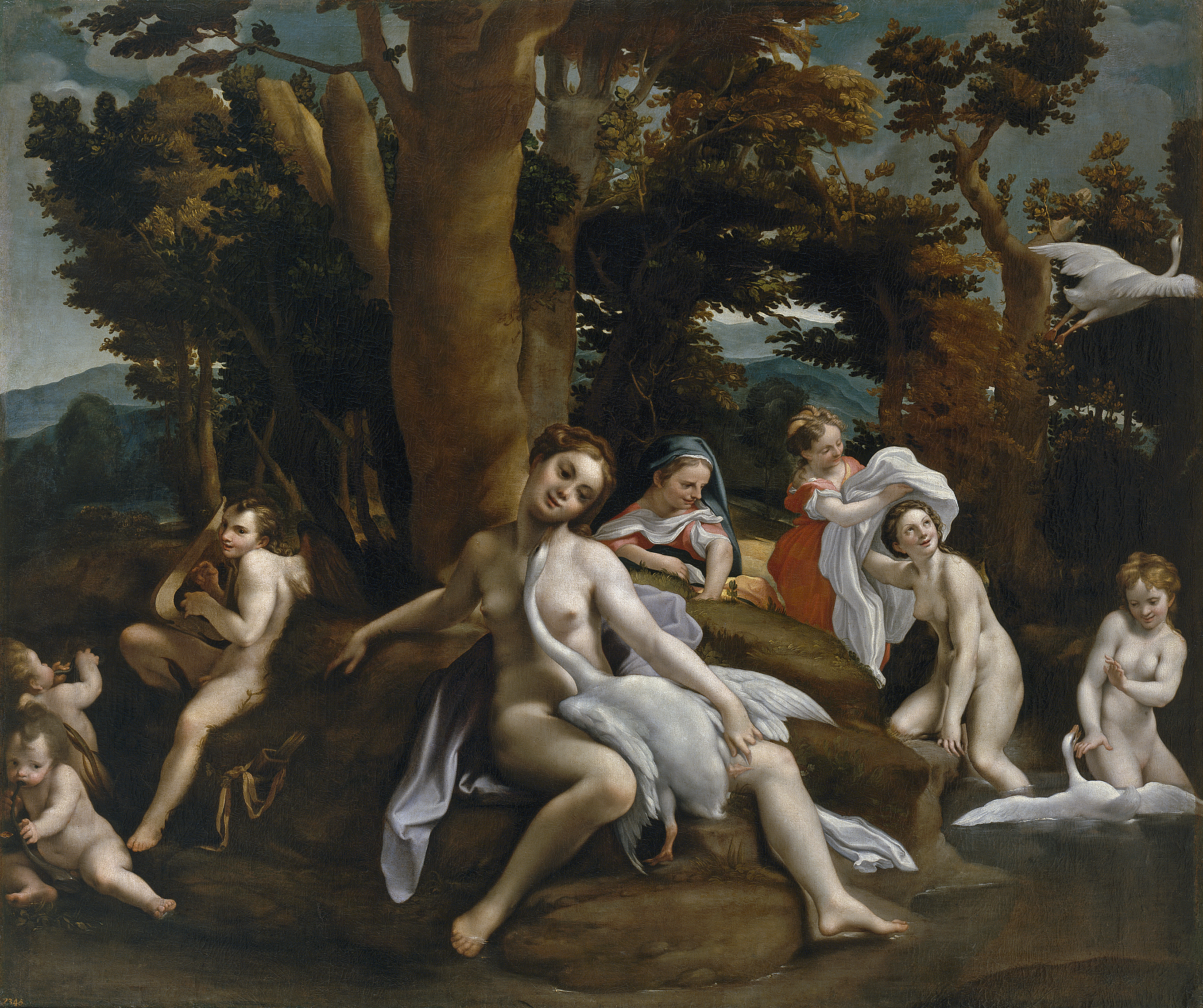 La obra representa a Zeus, convertido en cisne, seduciendo y haciendo el amor con Leda.